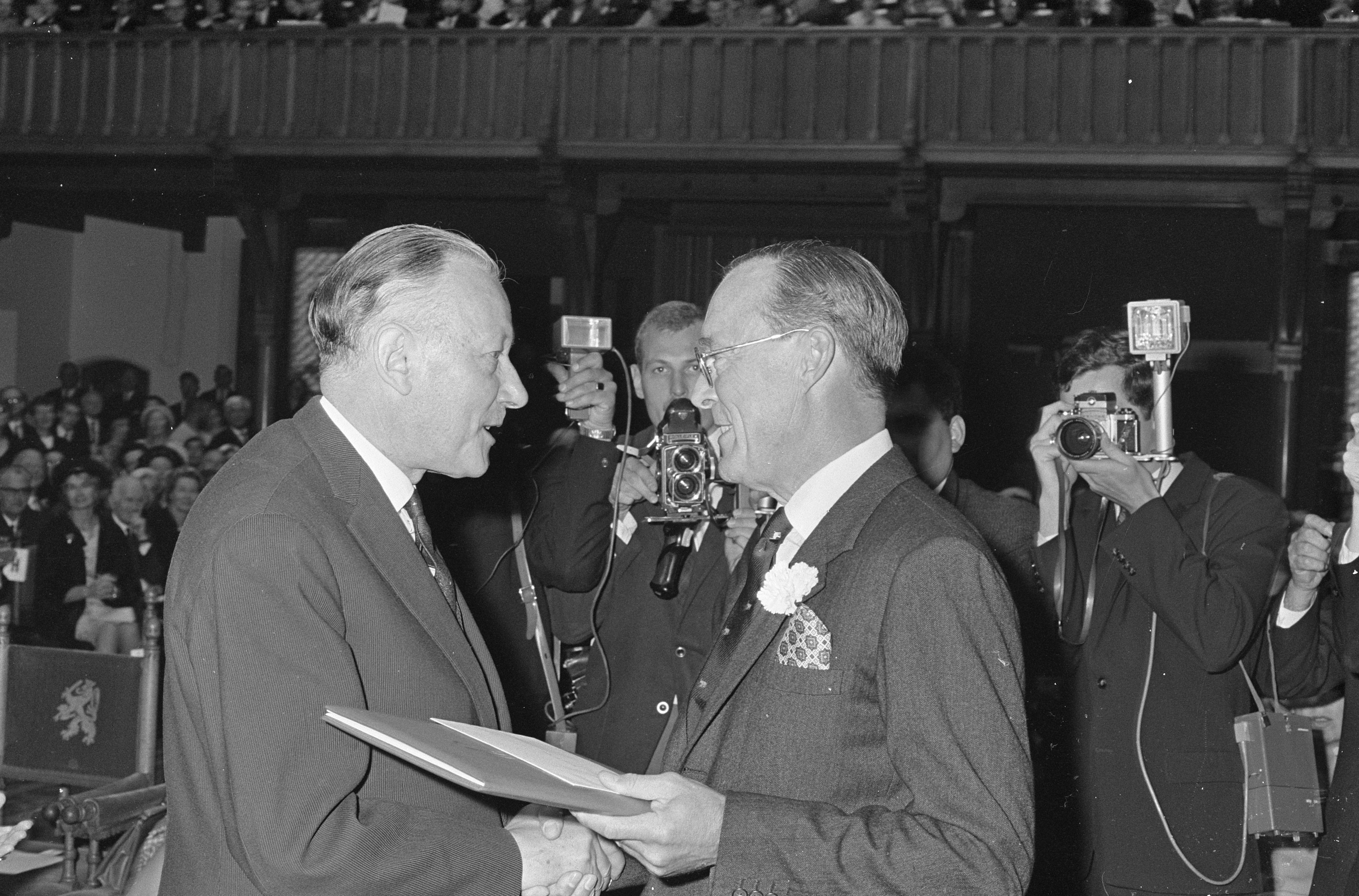 Collectie / Archief : Fotocollectie Anefo Reportage / Serie : [ onbekend ] Beschrijving : Erasmusprijs 1966, uitreiking in Ridderzaal te Den Haag prins reikt prijs uit aan Fransman prof. Rene Huyghe Datum : 27 juni 1966 Locatie : Den Haag, Zuid-Holland Trefwoorden : Prijsuitreikingen, prinsen Persoonsnaam : Prof. Rene Huyghe Instellingsnaam : Ridderzaal Fotograaf : Nijs, Jac. de / Anefo Auteursrechthebbende : Nationaal Archief Materiaalsoort : Negatief (zwart/wit) Nummer archiefinventaris : bekijk toegang 2.24.01.05 Bestanddeelnummer : 919-2923